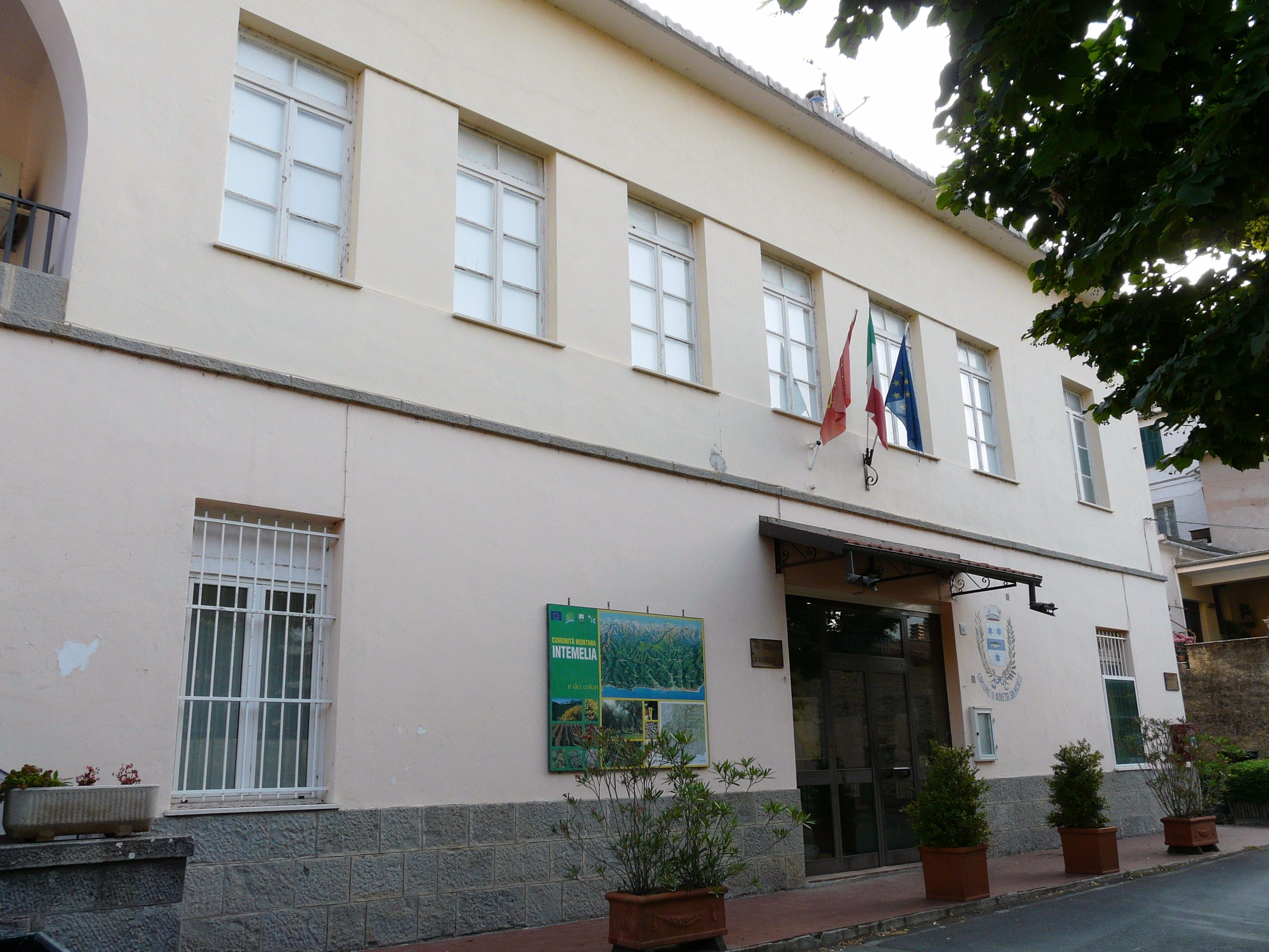 Municipio di Olivetta San Michele, Liguria, Italia